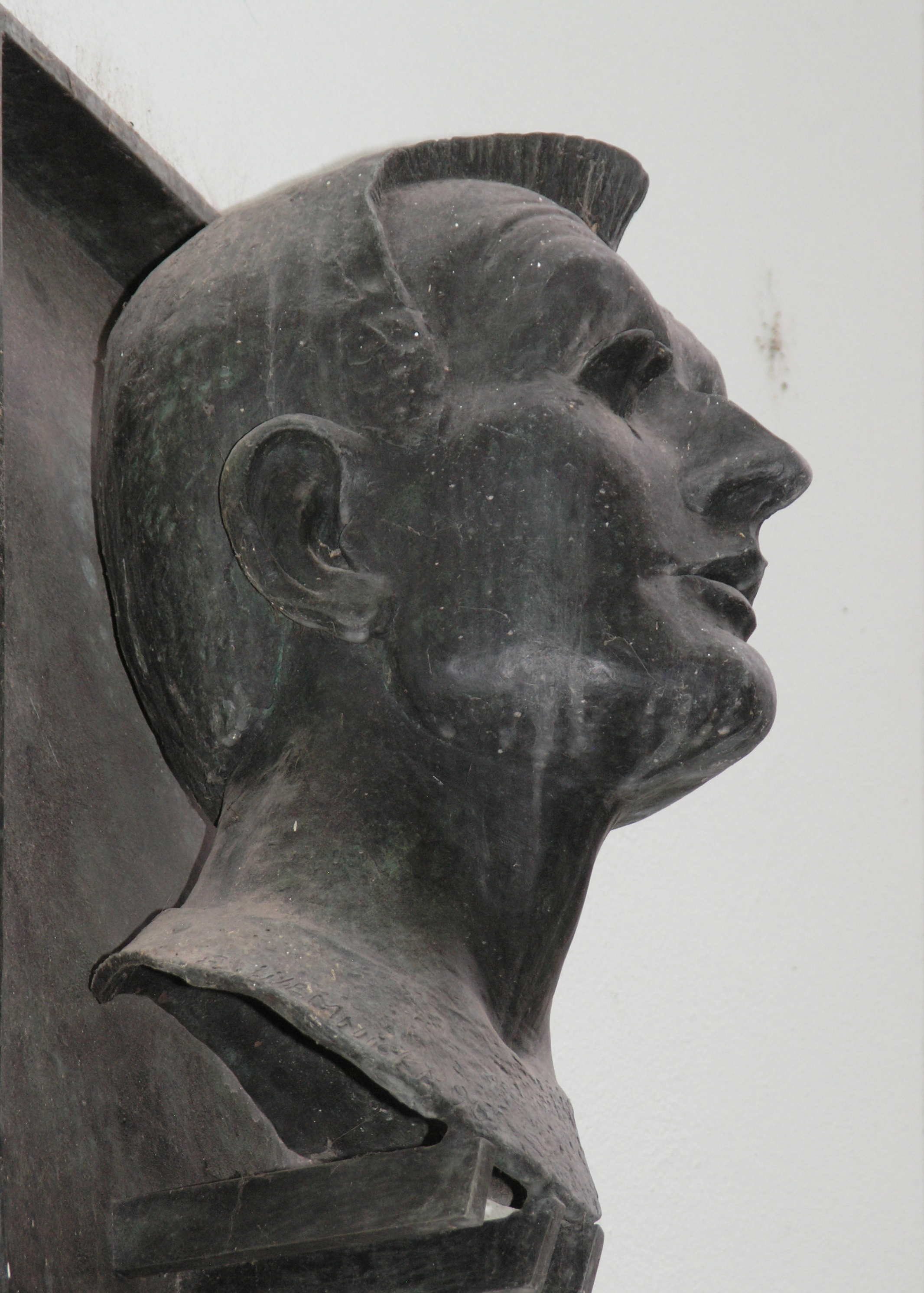 Praha, Staré město - Anenské náměstí 5 (busta Ladislava Fialky)